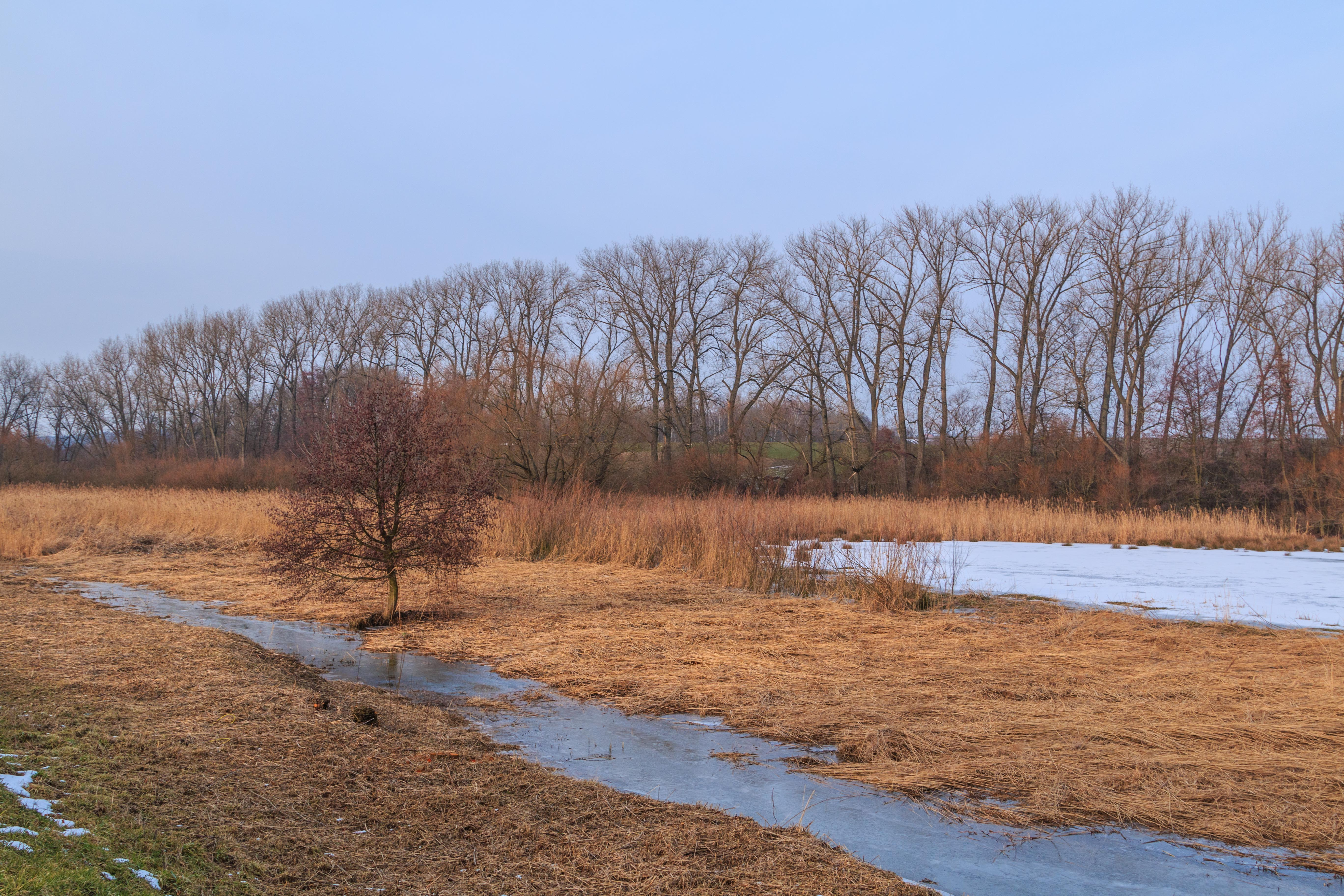 Zásobní rybník u Bartoušova